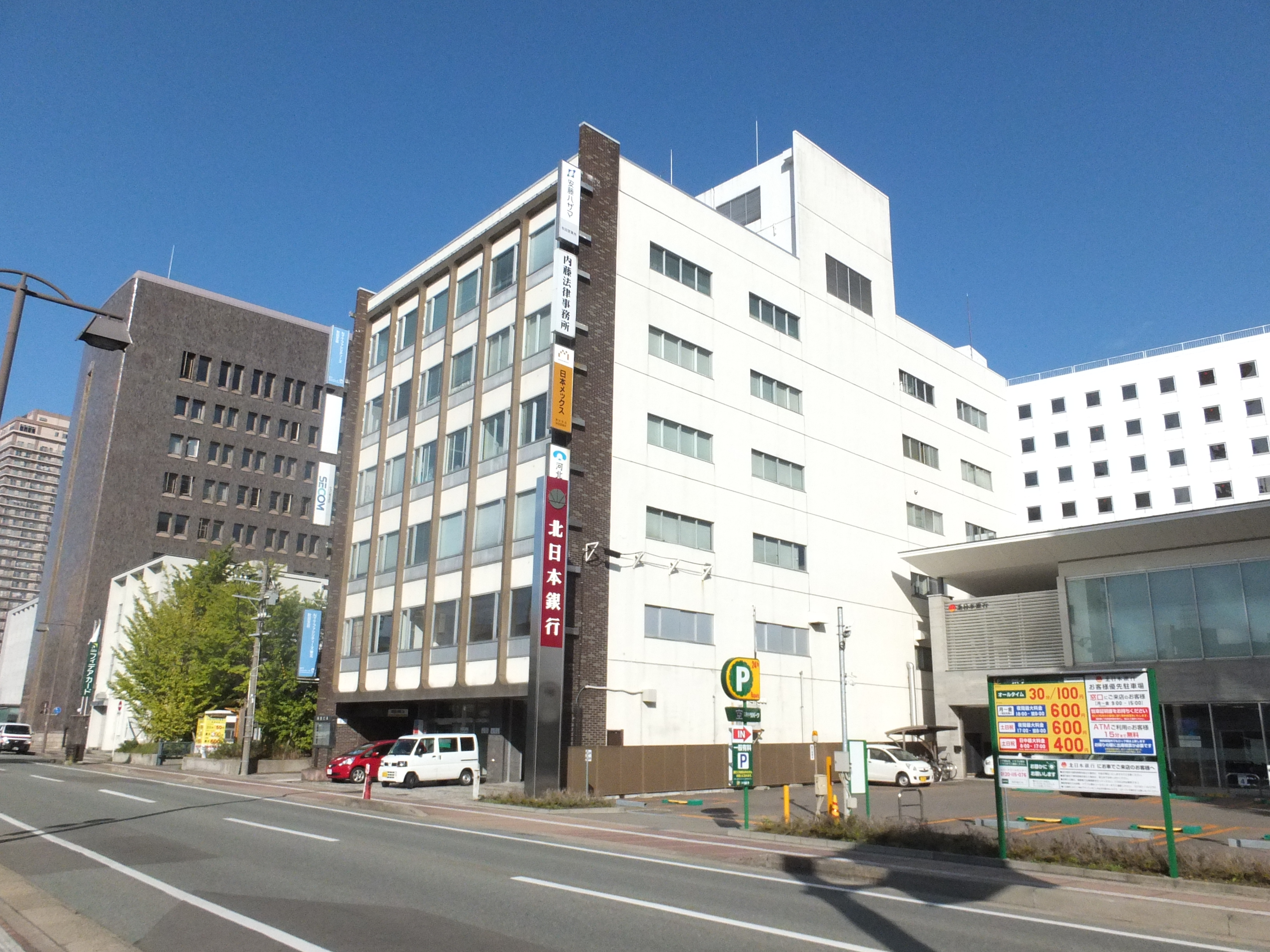 秋田河北ビル（秋田市中通）